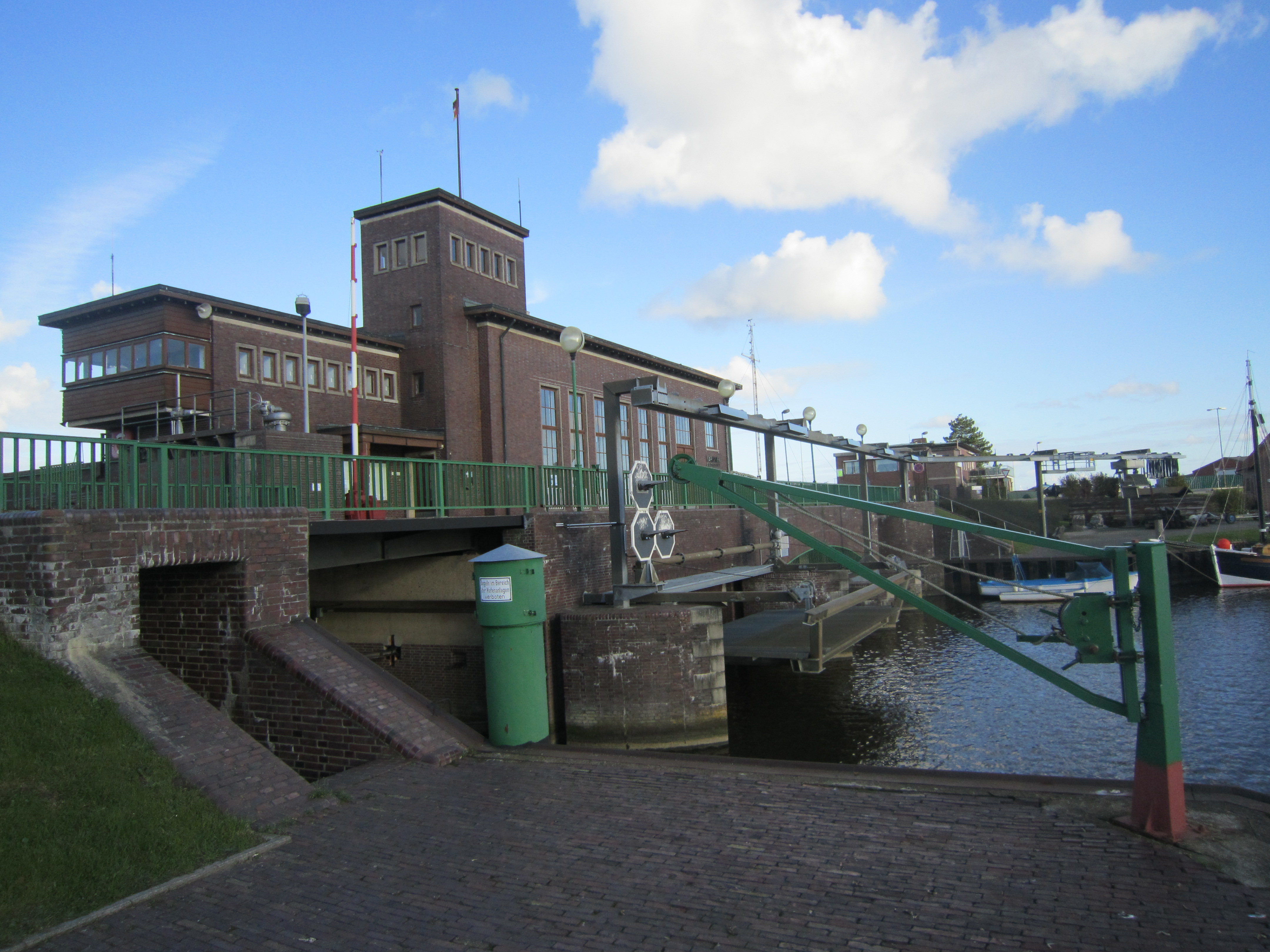 Harlesiel